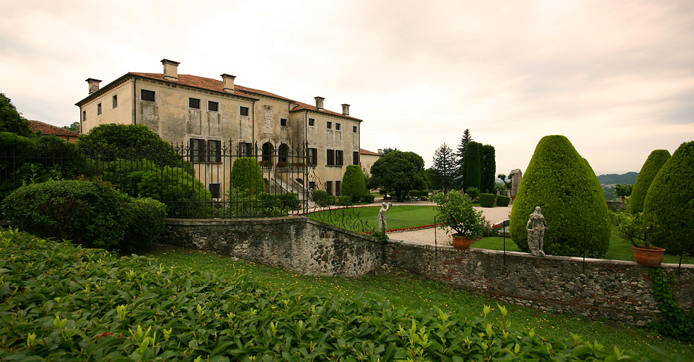 Villa Godi Malinverni, Lonedo di Lugo, Veneto, Italy, Front